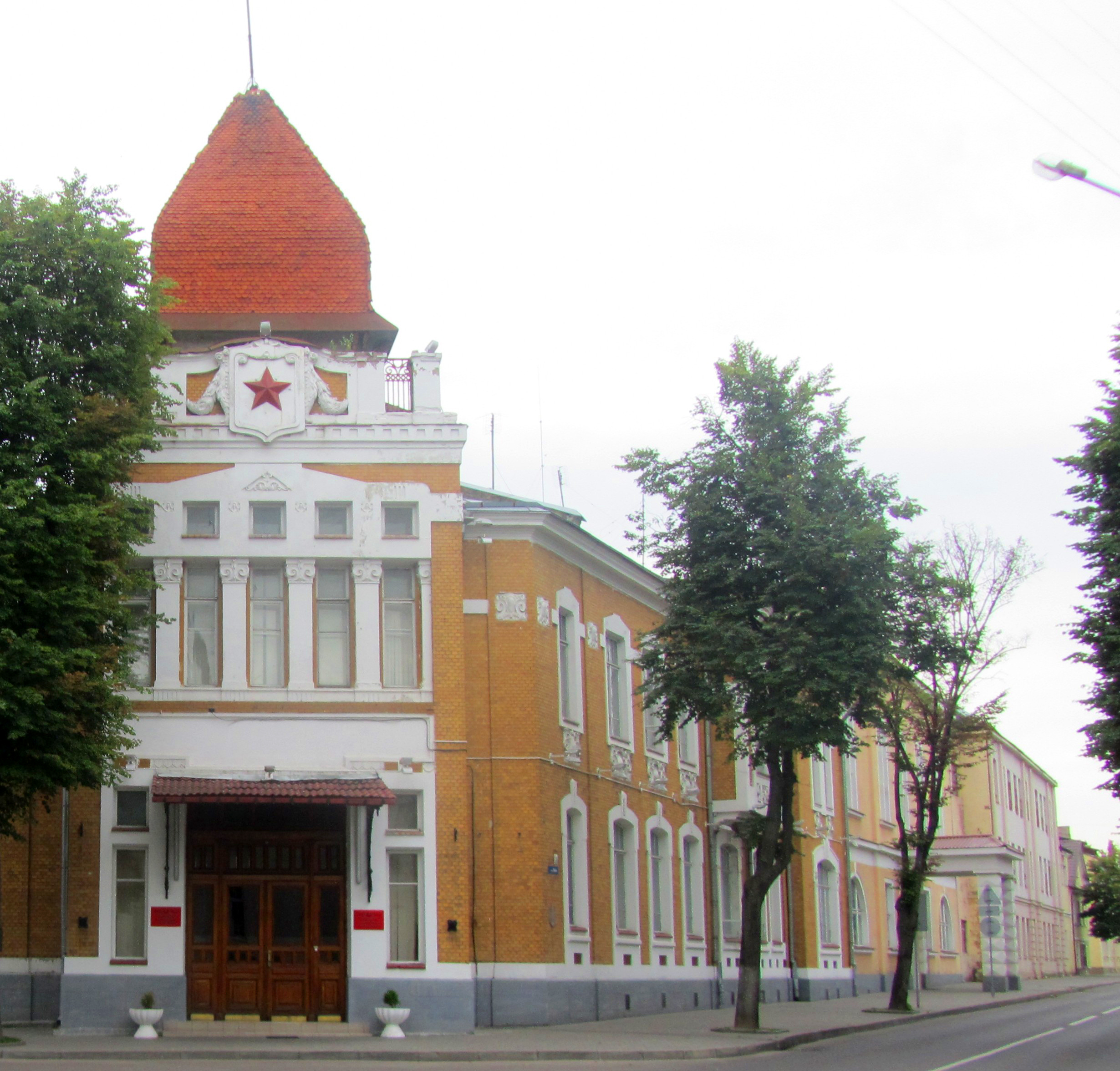 Беларуская (тарашкевіца): Будынак былога пазямельнага банка(архітэктар Б.П. Астравумаў) This is a photo of Belarusian heritage monument. Reference number: 412Г000656 ( WLM)